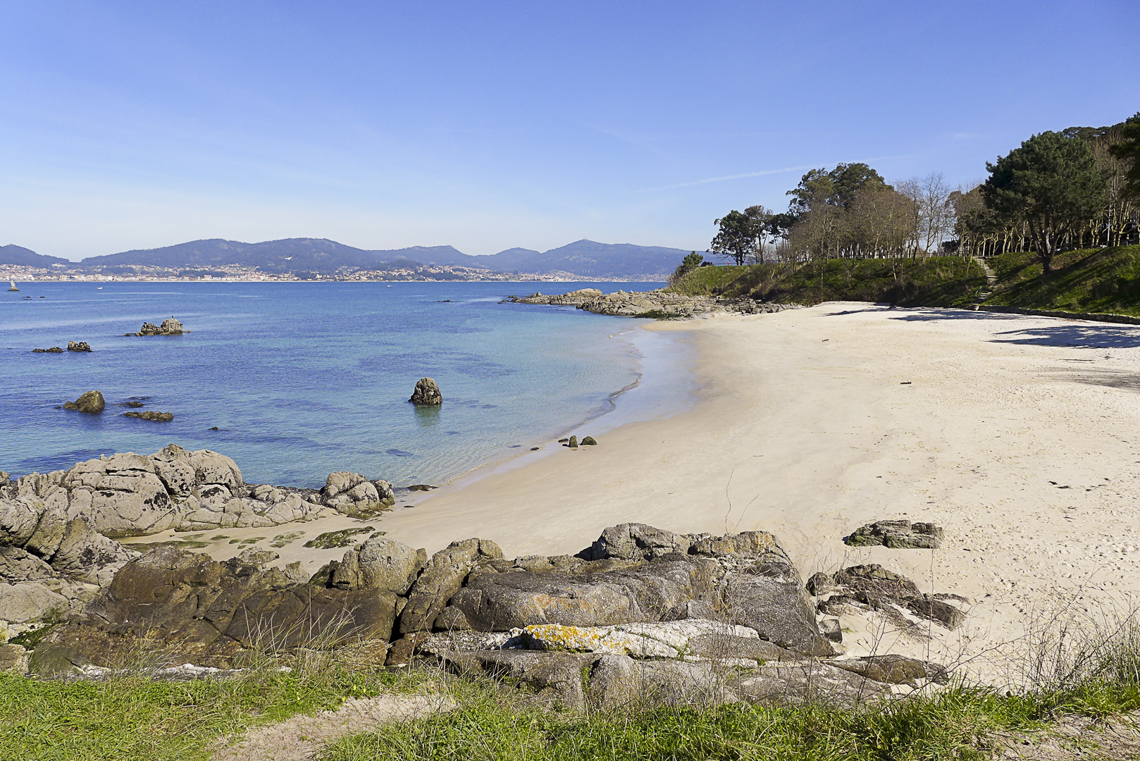 Spain-Vigo-Playa del Vao-P1160876